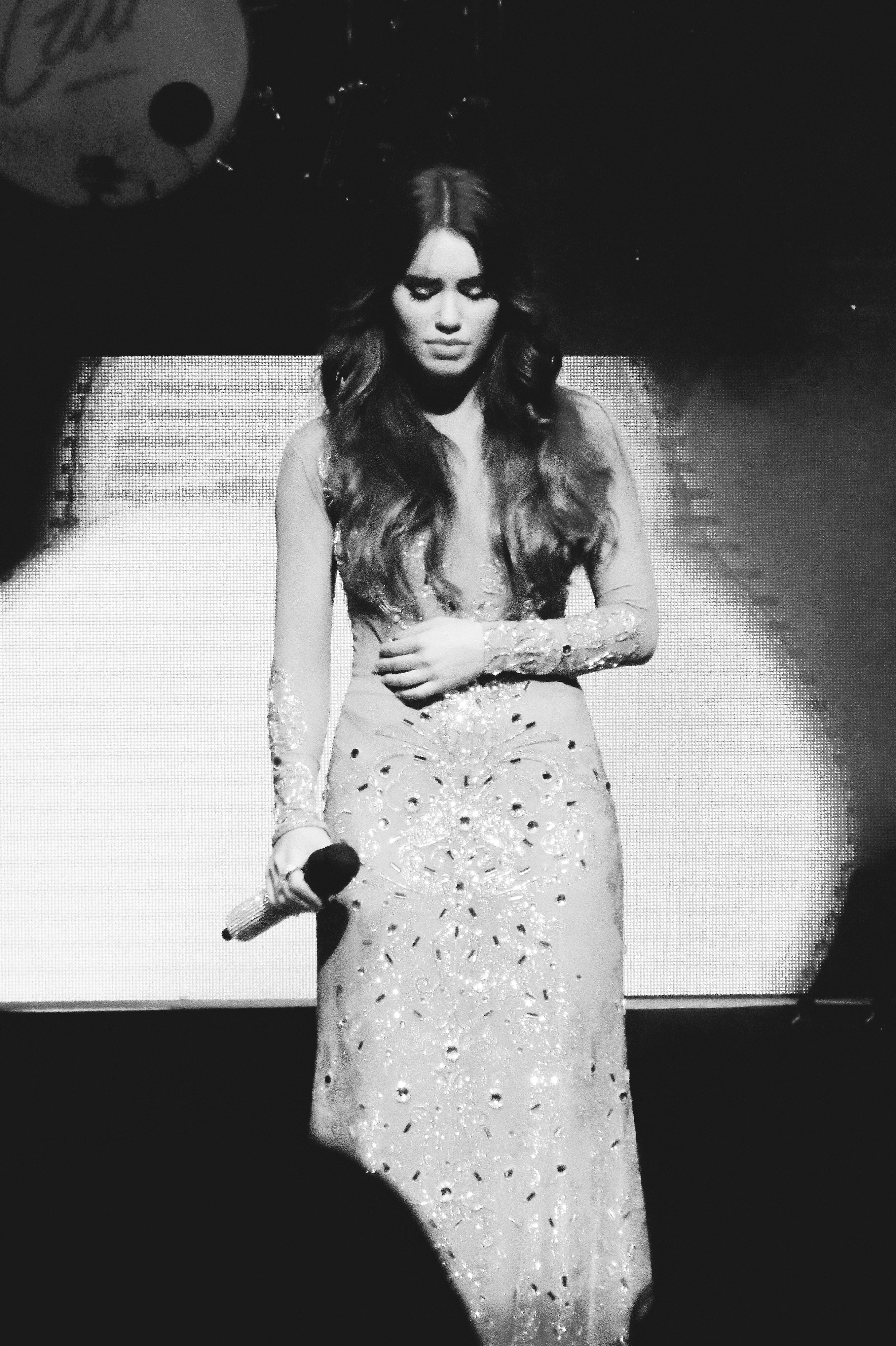 Lali en el primer show del Soy tour.